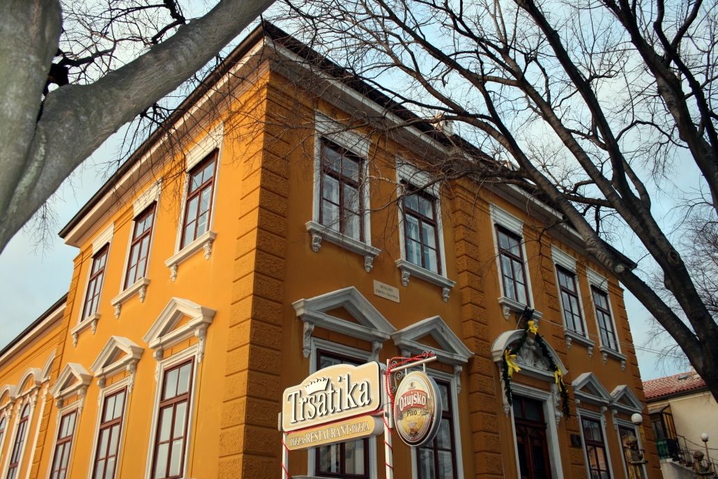 Hrvatska čitaonica Trsat, sagrađena 1897. godine, Rijeka